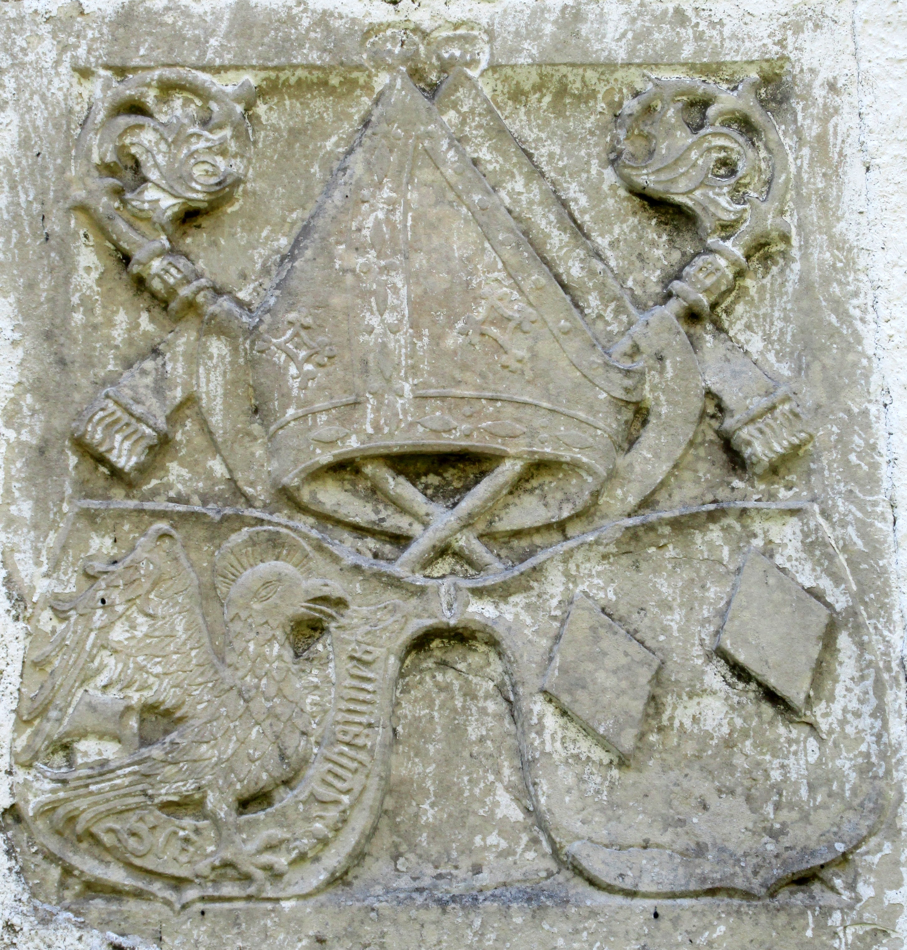 Saare-Lääne piiskopi Johannes III Orgase (1492–1515) vapikivi Martna kirikul